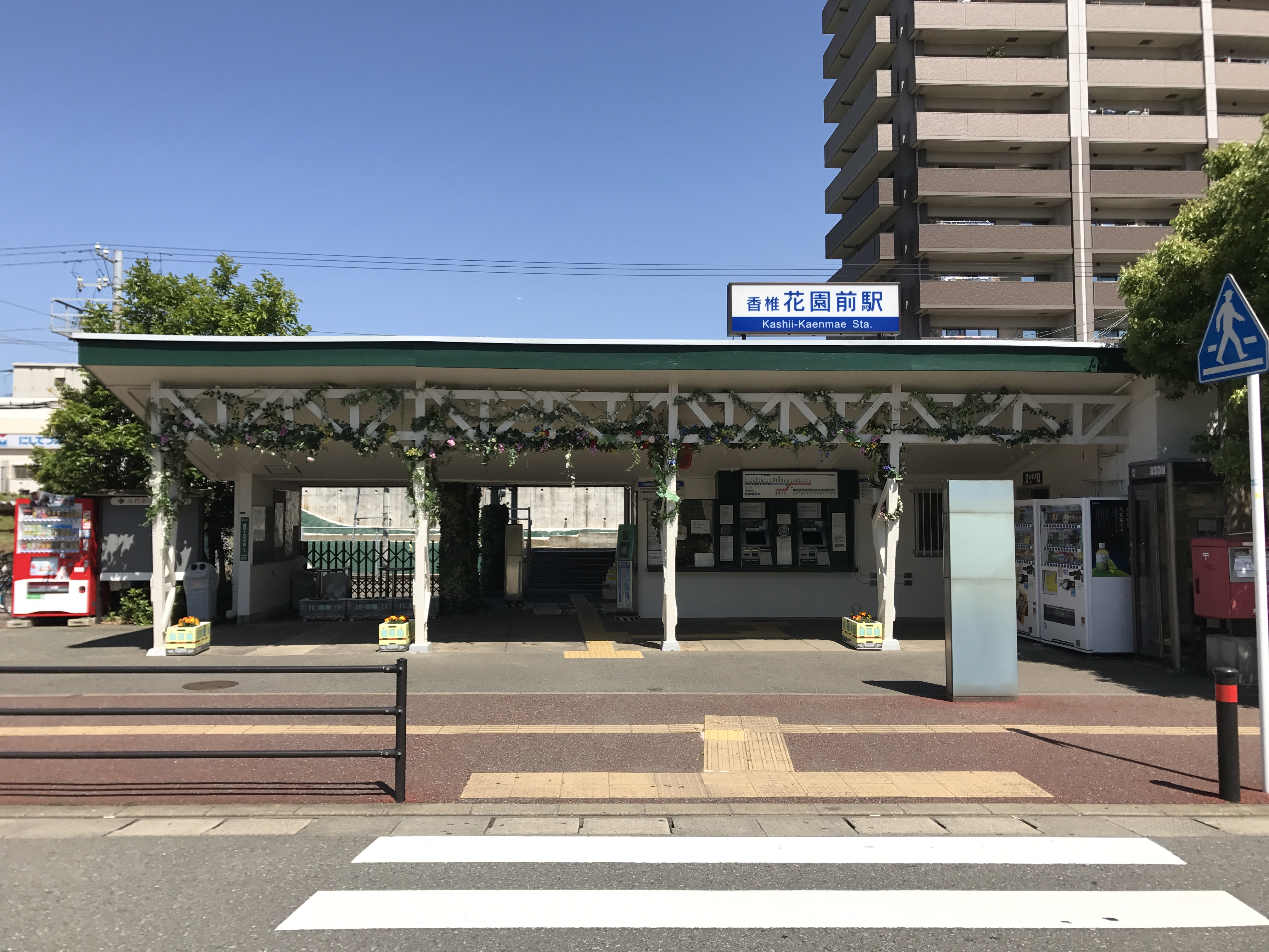 香椎花園前駅駅舎